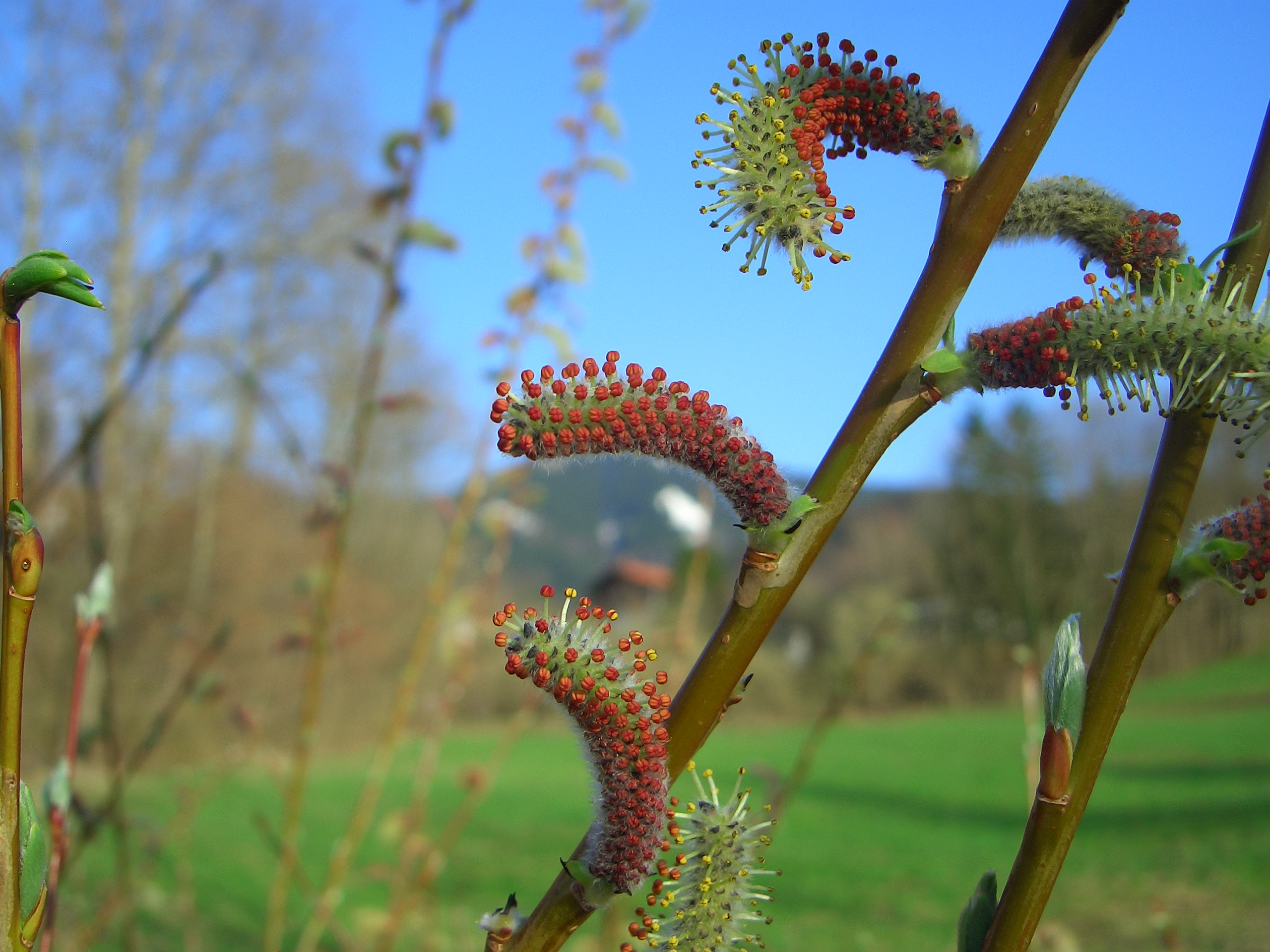 Salix purpurea - Purpur-Weide im Frühjahr